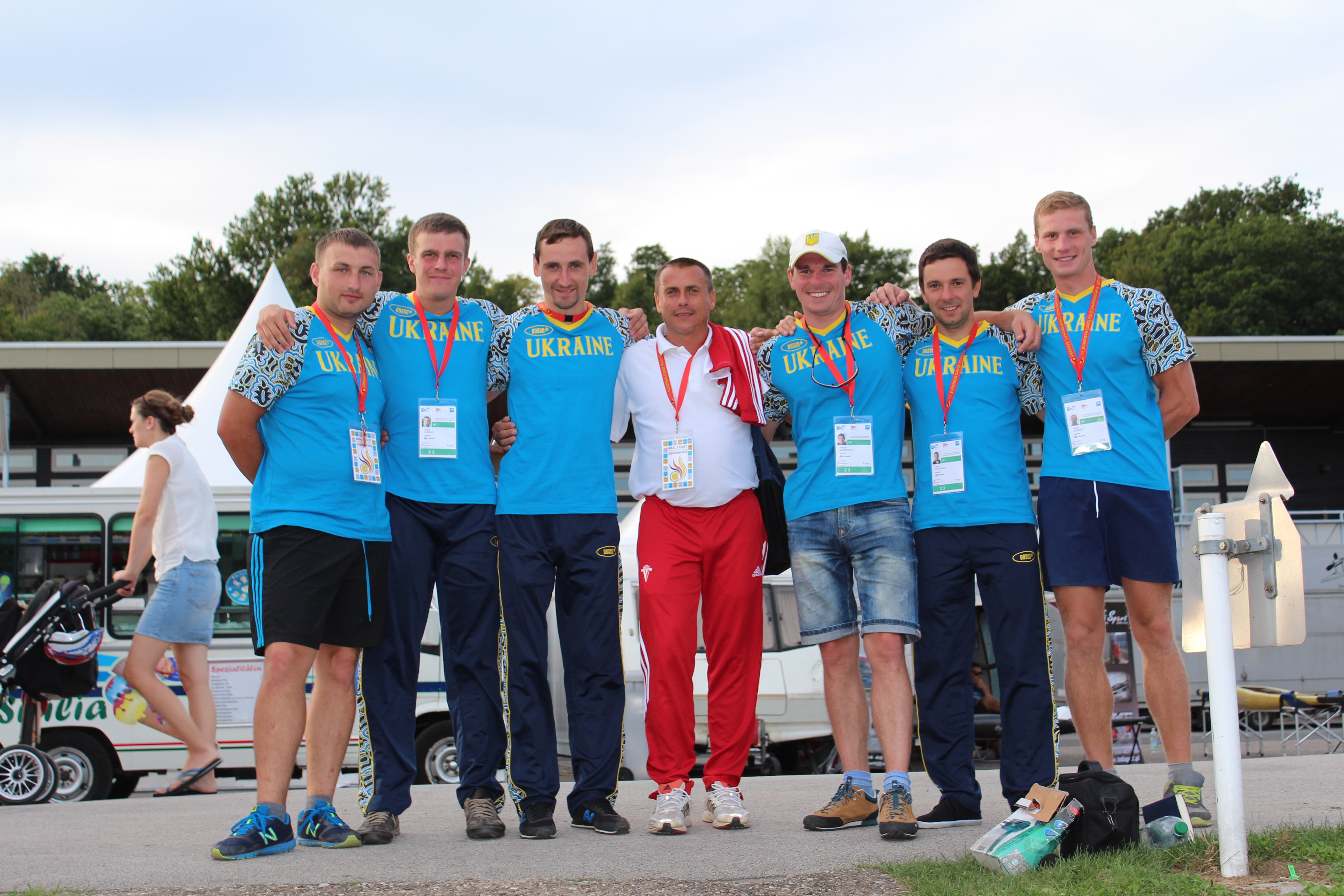 Збірна України з кануполо 2015р. Ессен, Німеччина